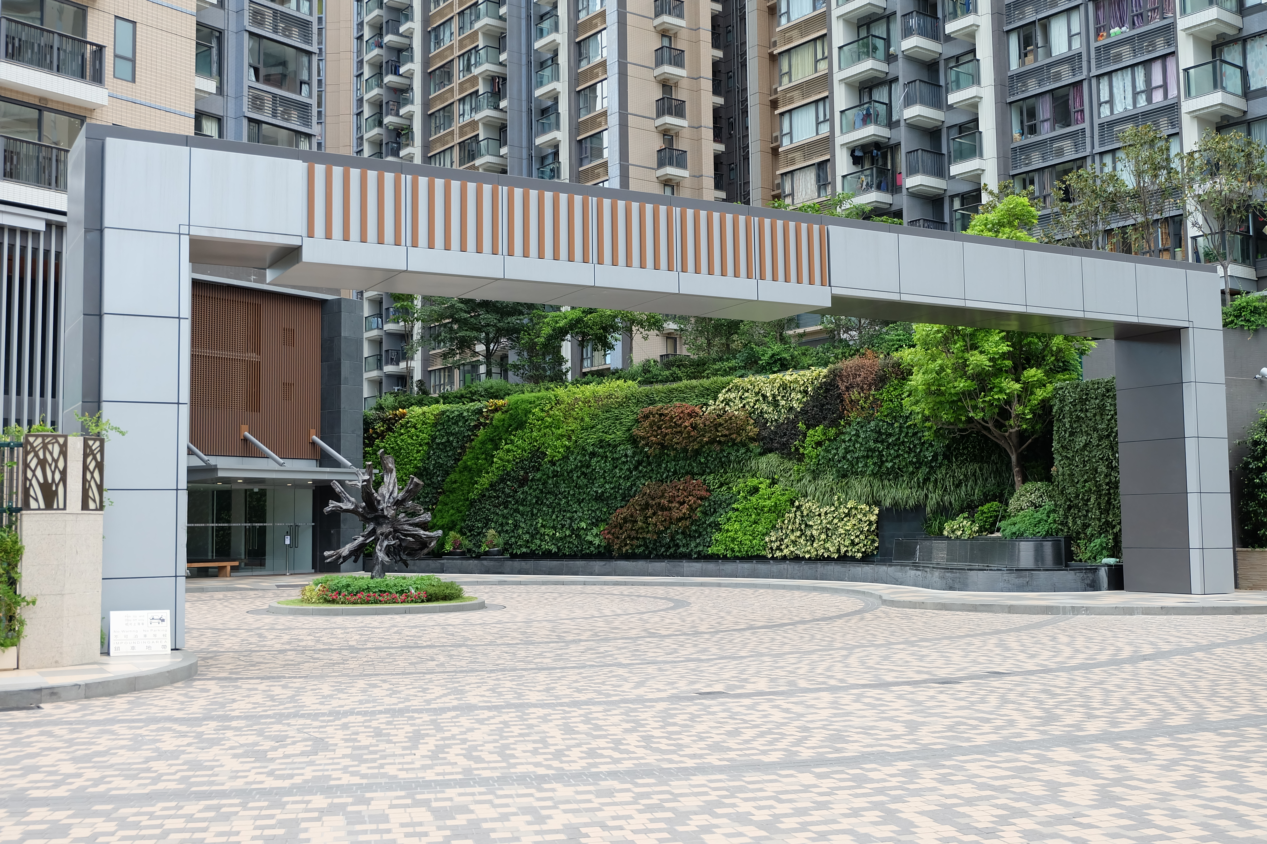 中文（香港）: 溱柏屋苑車路迴旋處